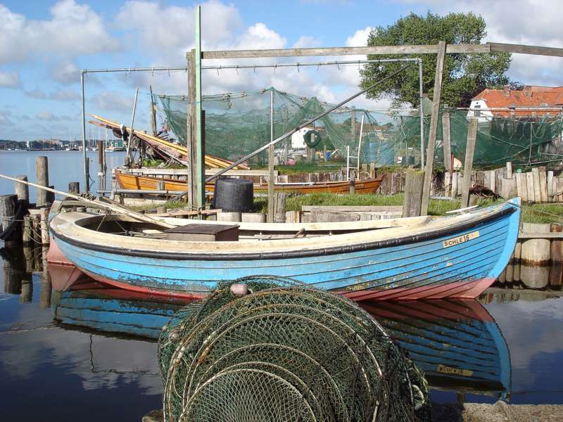 Fischerboote am Holm in Schleswig